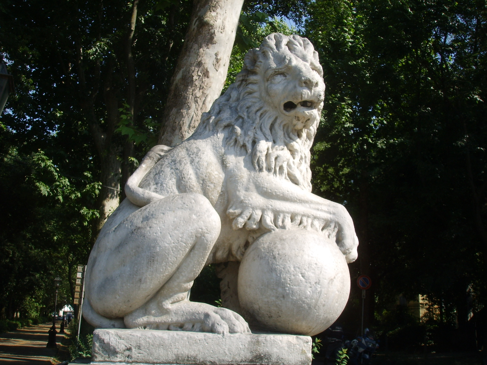 Viale di poggio imperiale, marzocco